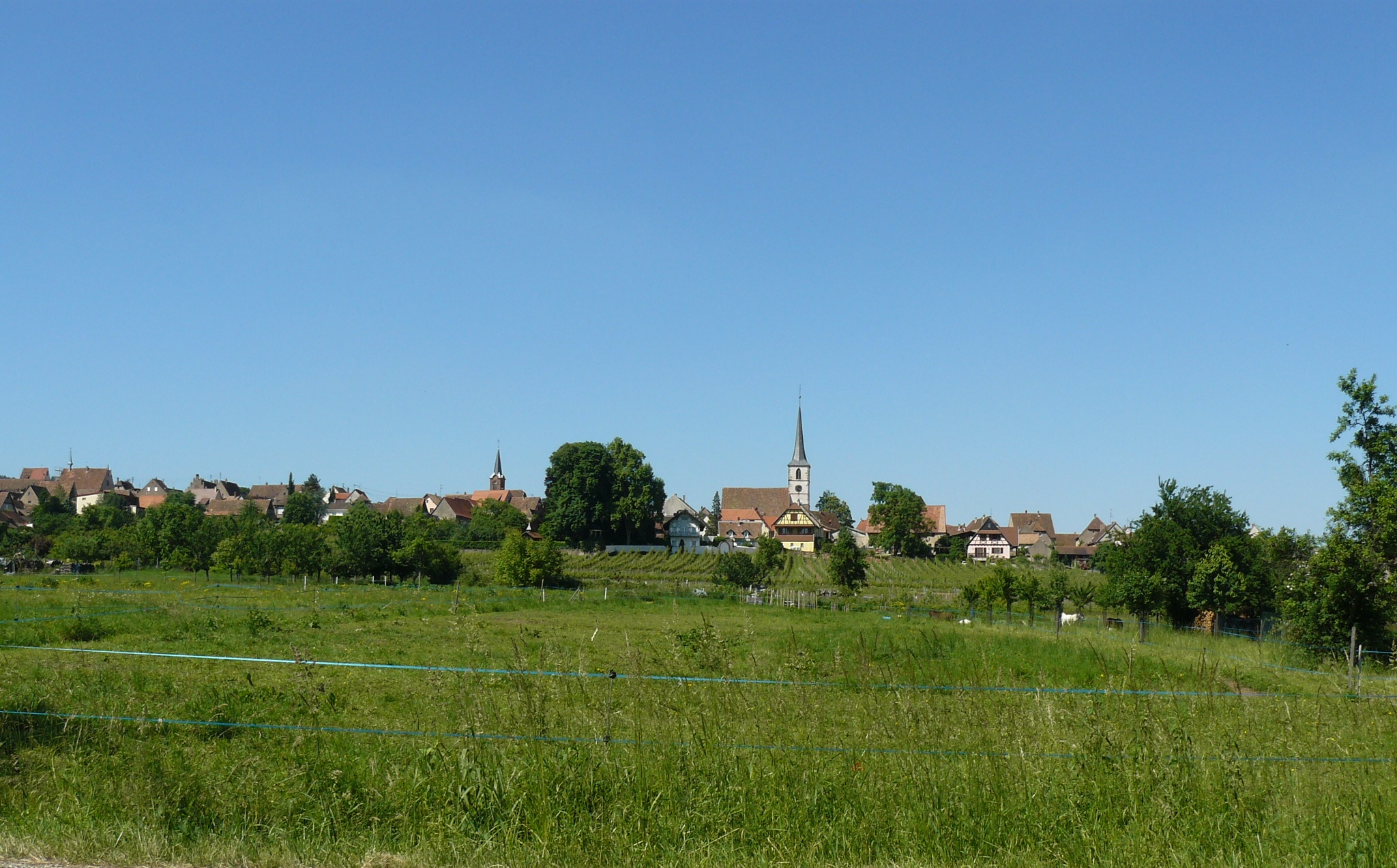 Vue sur le village de Mittelbergheim